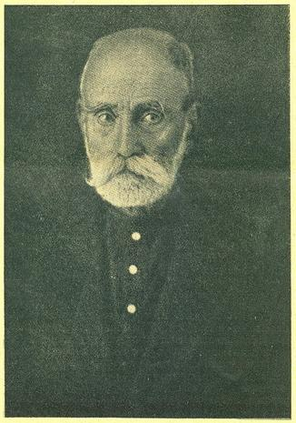 Георги Пейков.